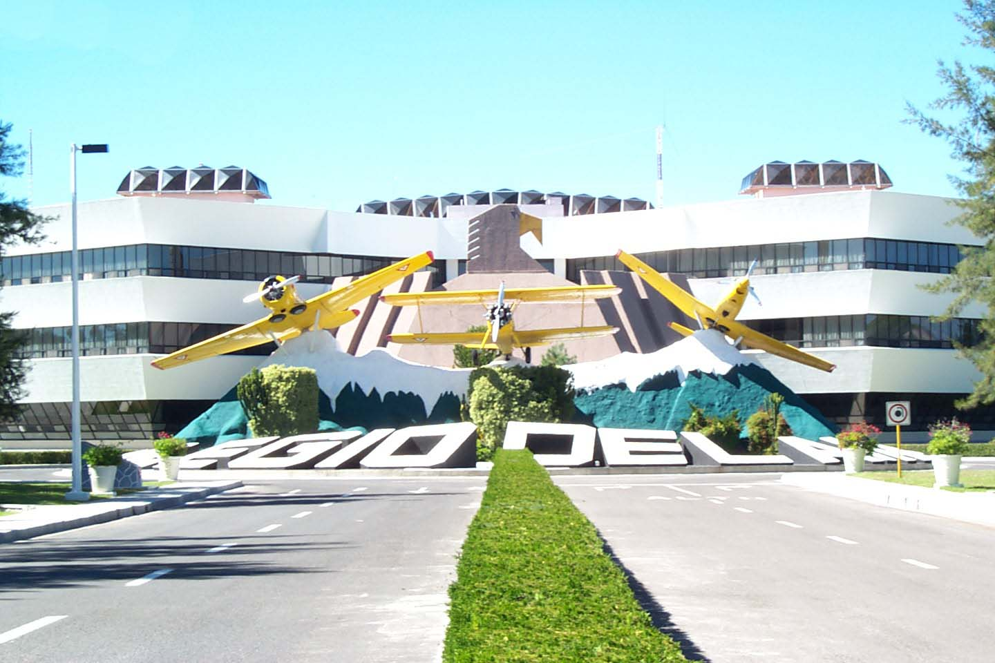 Fachada principal del colegio del aire en Zapopan Jalisco